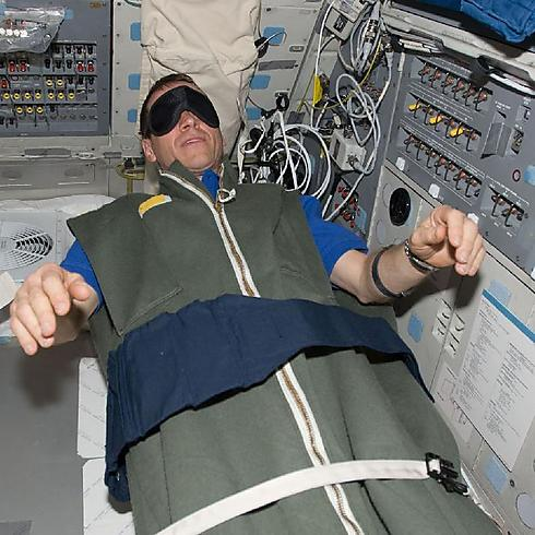 אסטרונאוט ישן בחלל